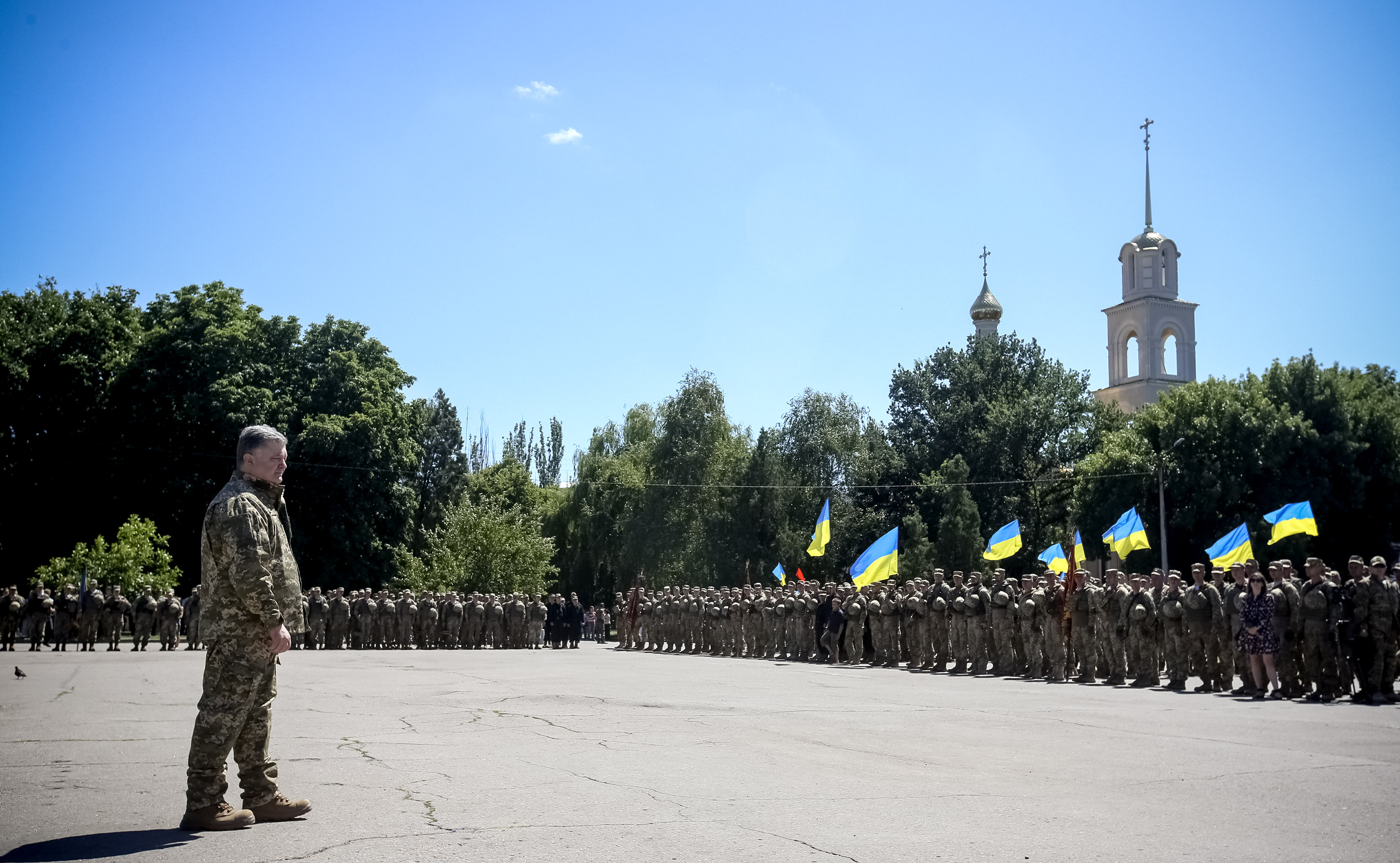 Рабочая поездка Порошенко в Донецкую область